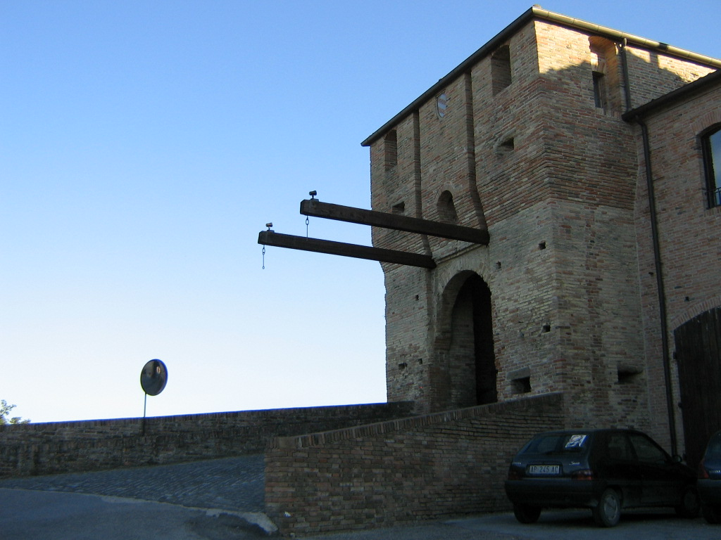 Ponte levatoio, Mondaino (RN), Italy